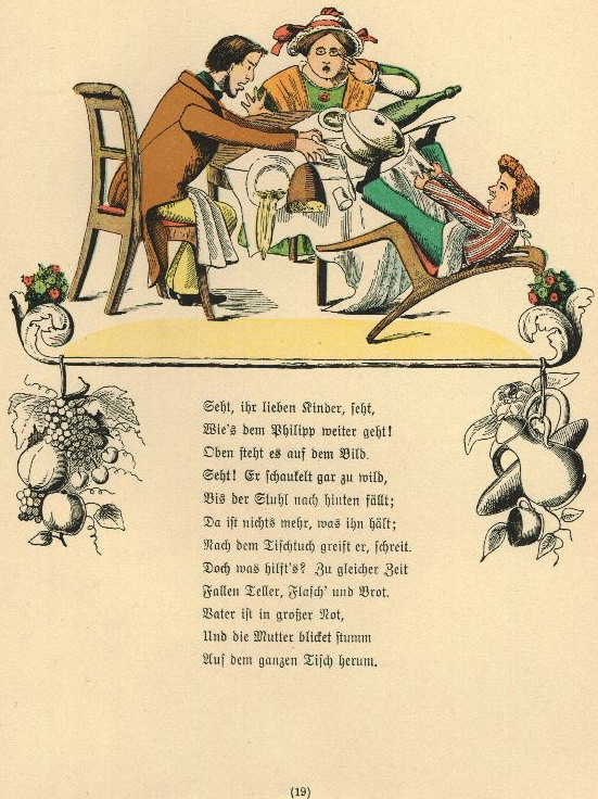 Der Struwwelpeter: Die Geschichte vom Zappel-Philipp Tafel 2